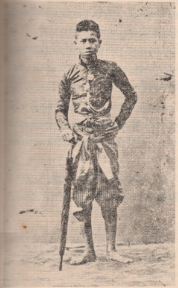 พระยาอภิรักษ์ตัวัยหนุ่ม